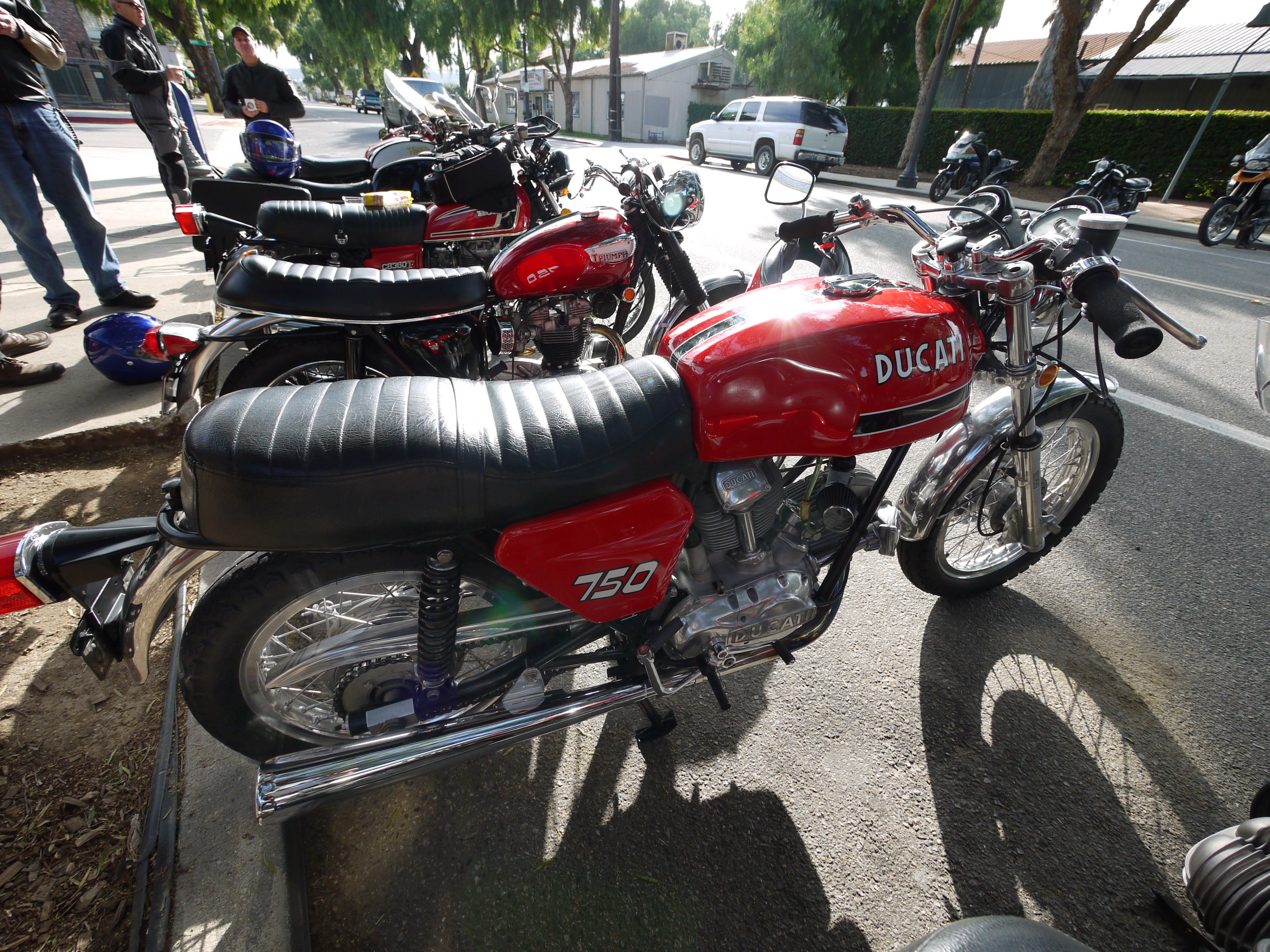 Ducati 750 GT (1971-1974)